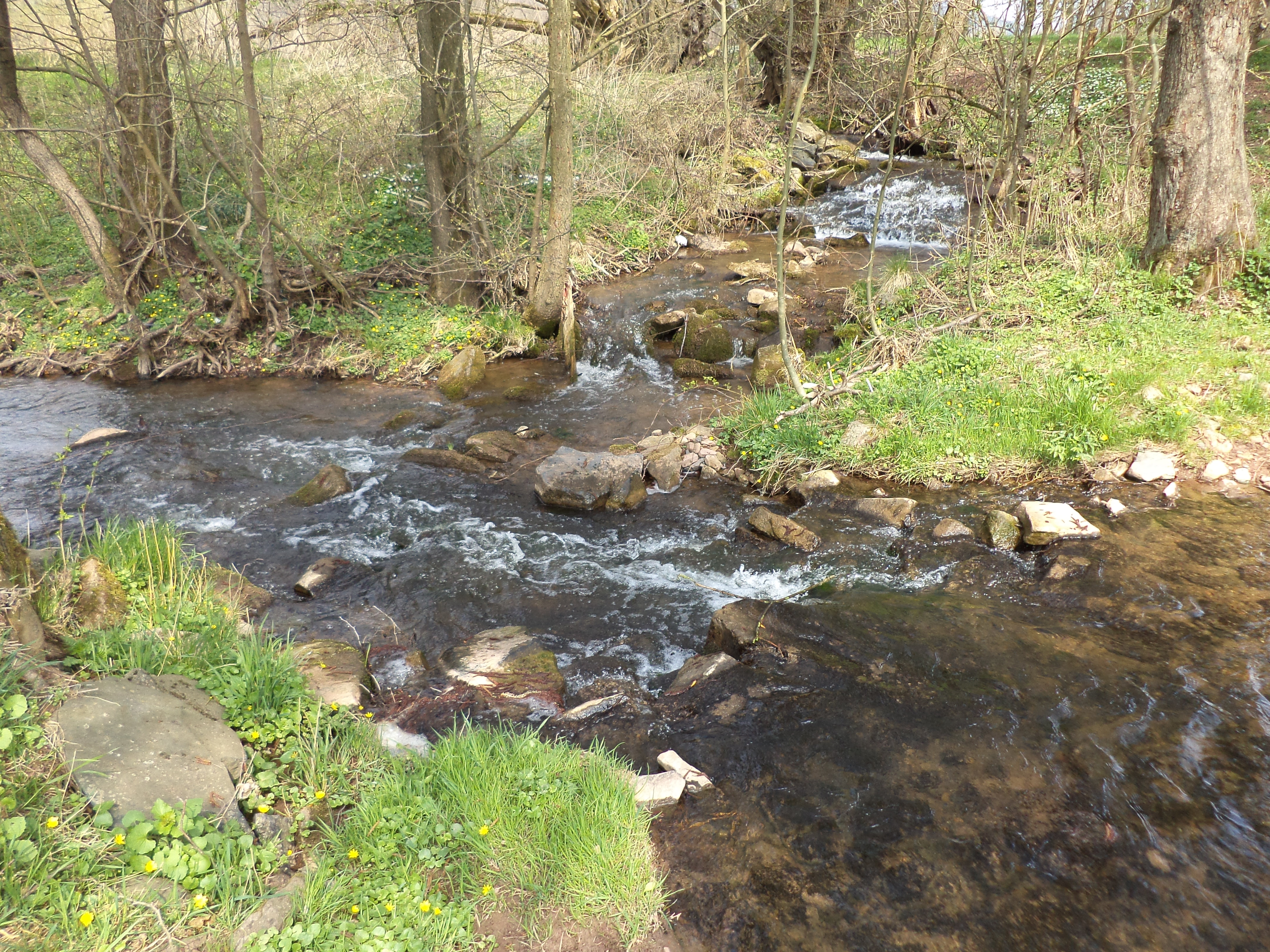 Das Ramholzer Wasser (hinten) mündet in die Kinzig (von rechts nach links)